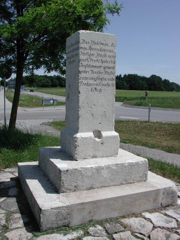 "Maxlstein"